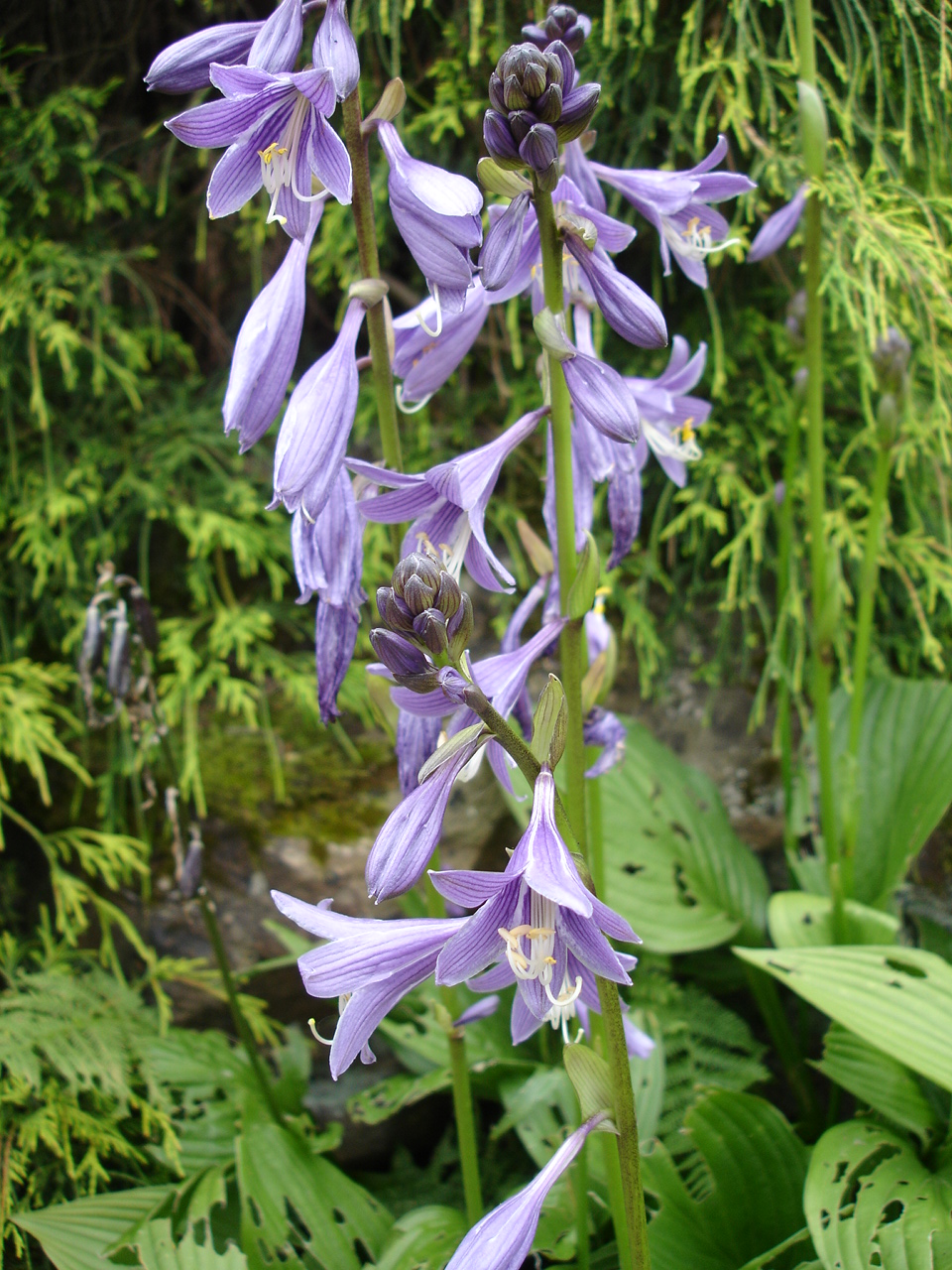 Hosta rectifolia 'Junco'